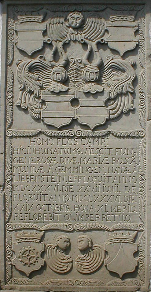 Schmuckvolles Epitaph für Maria Rosamunde von Gemmingen (* 27. Juni 1636 in Liebenstein, † 29. Oktober 1686) an der evang. Kirche in Neckarzimmern, mit Wappen Gemmingen und Liebenfels sowie Ahnenwappen (Gemmingen, Liebenfels, Thumb von Neuburg?), Klenke von Renckhausen (?), ?